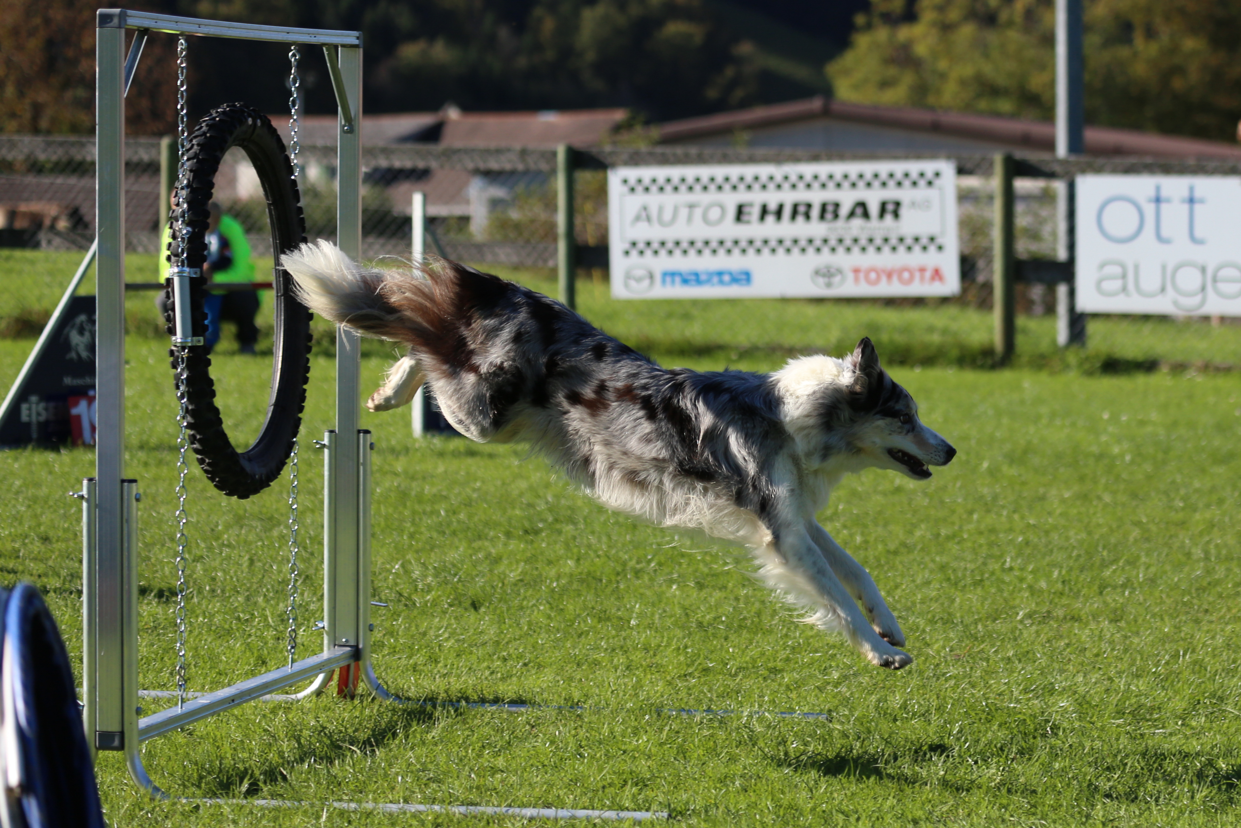 Agility-Wettkampf in der Ostschweiz – Sprung durch den Reifen